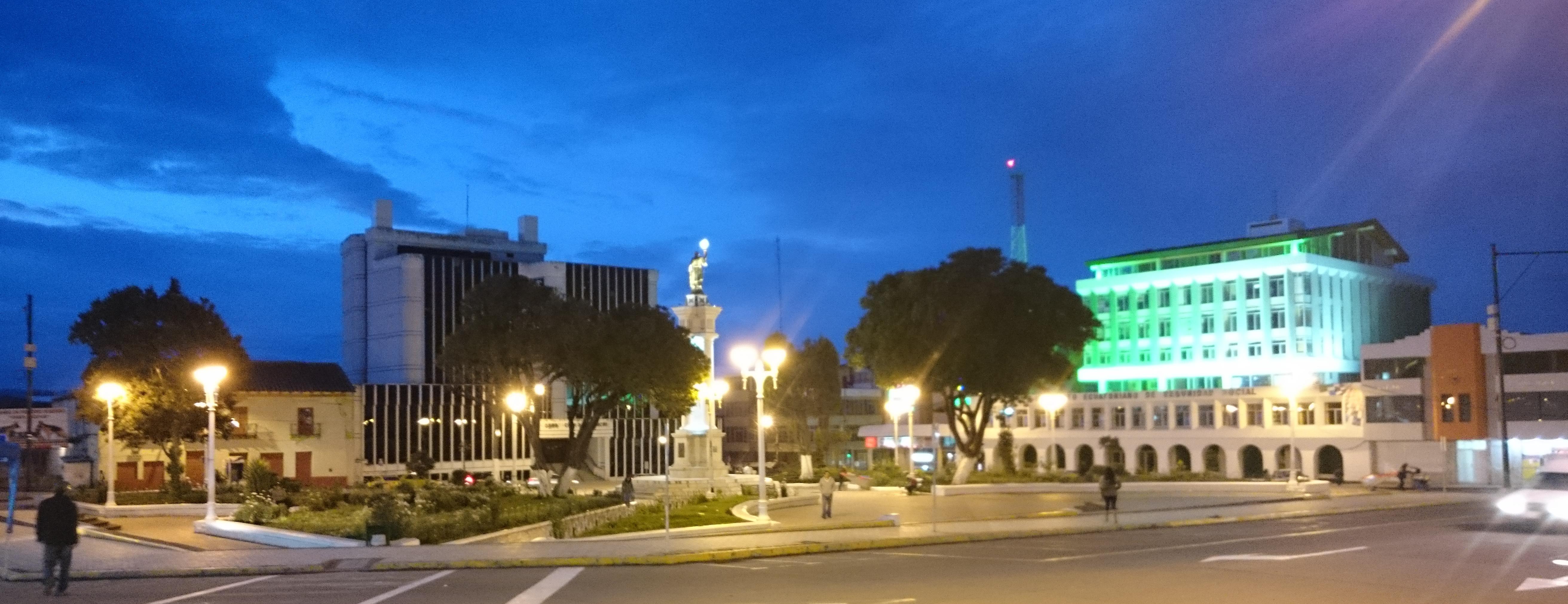 Parque central de Tulcán, atardecer